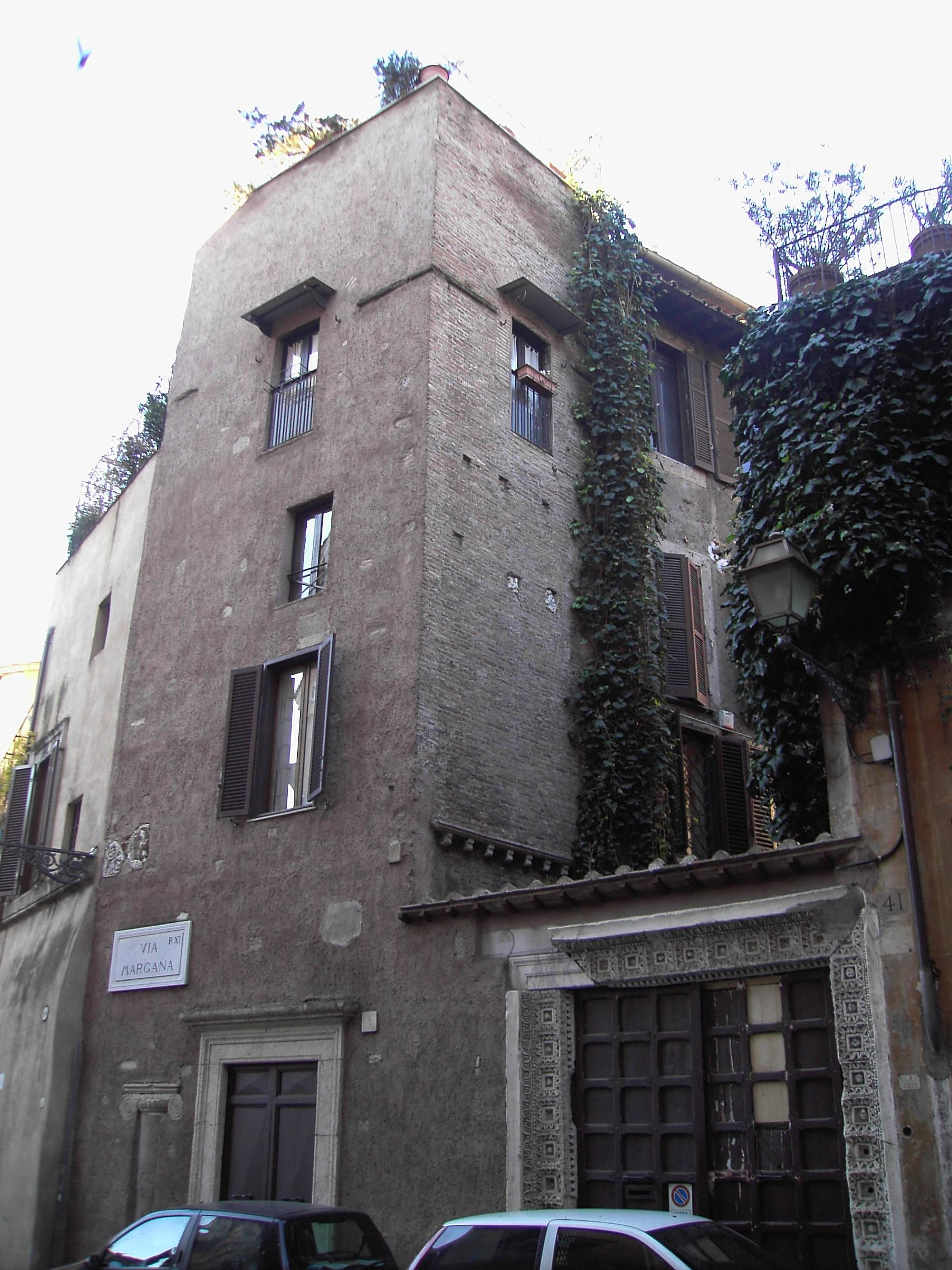 Roma, Tor Margana